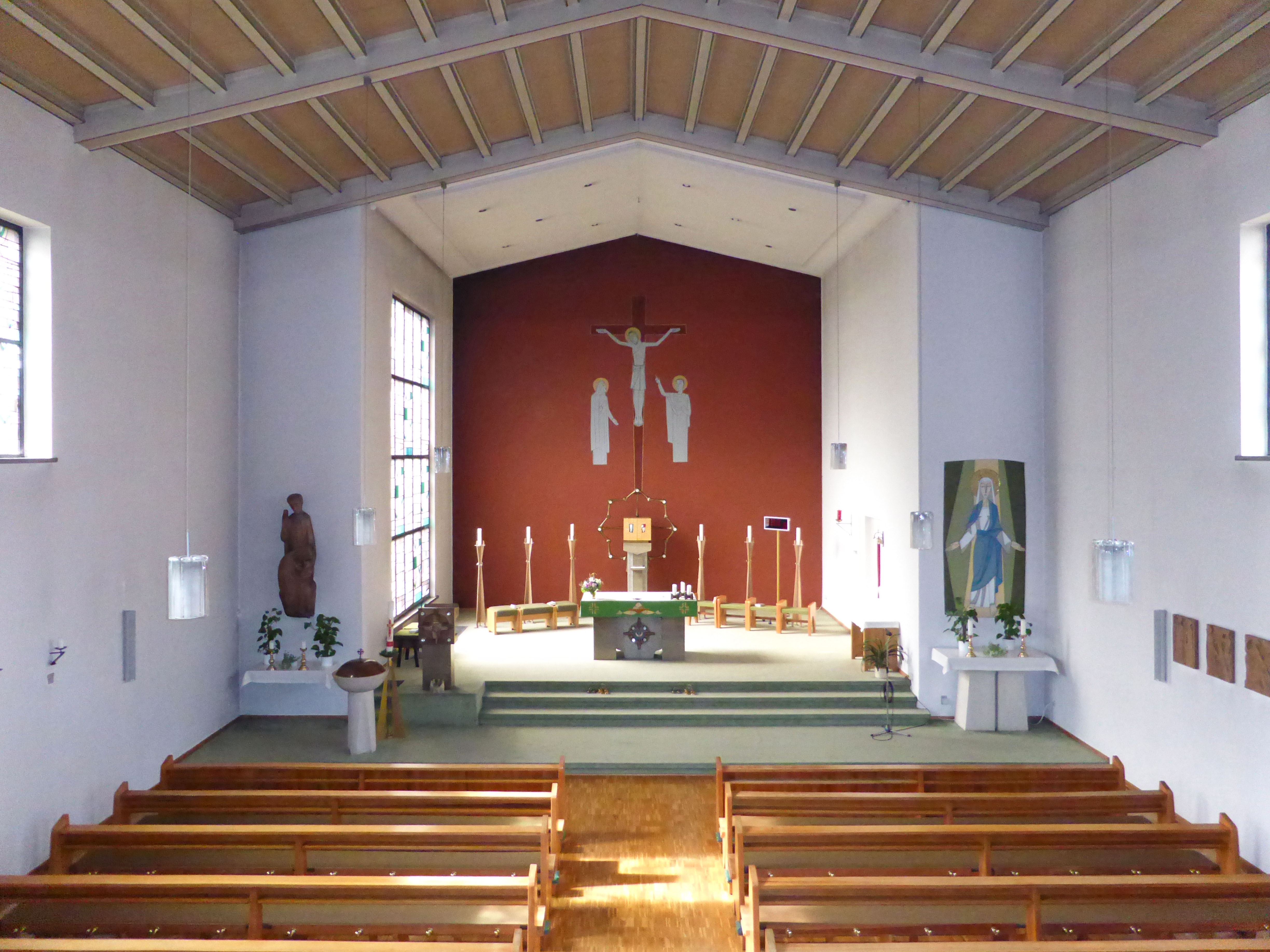 Katholische Kirche St. Joseph in Othfresen.